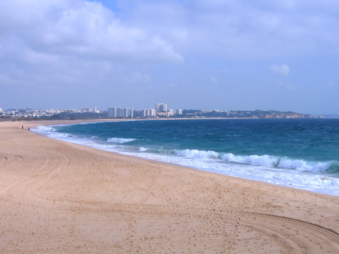 Portimão, a praia de Alvor.